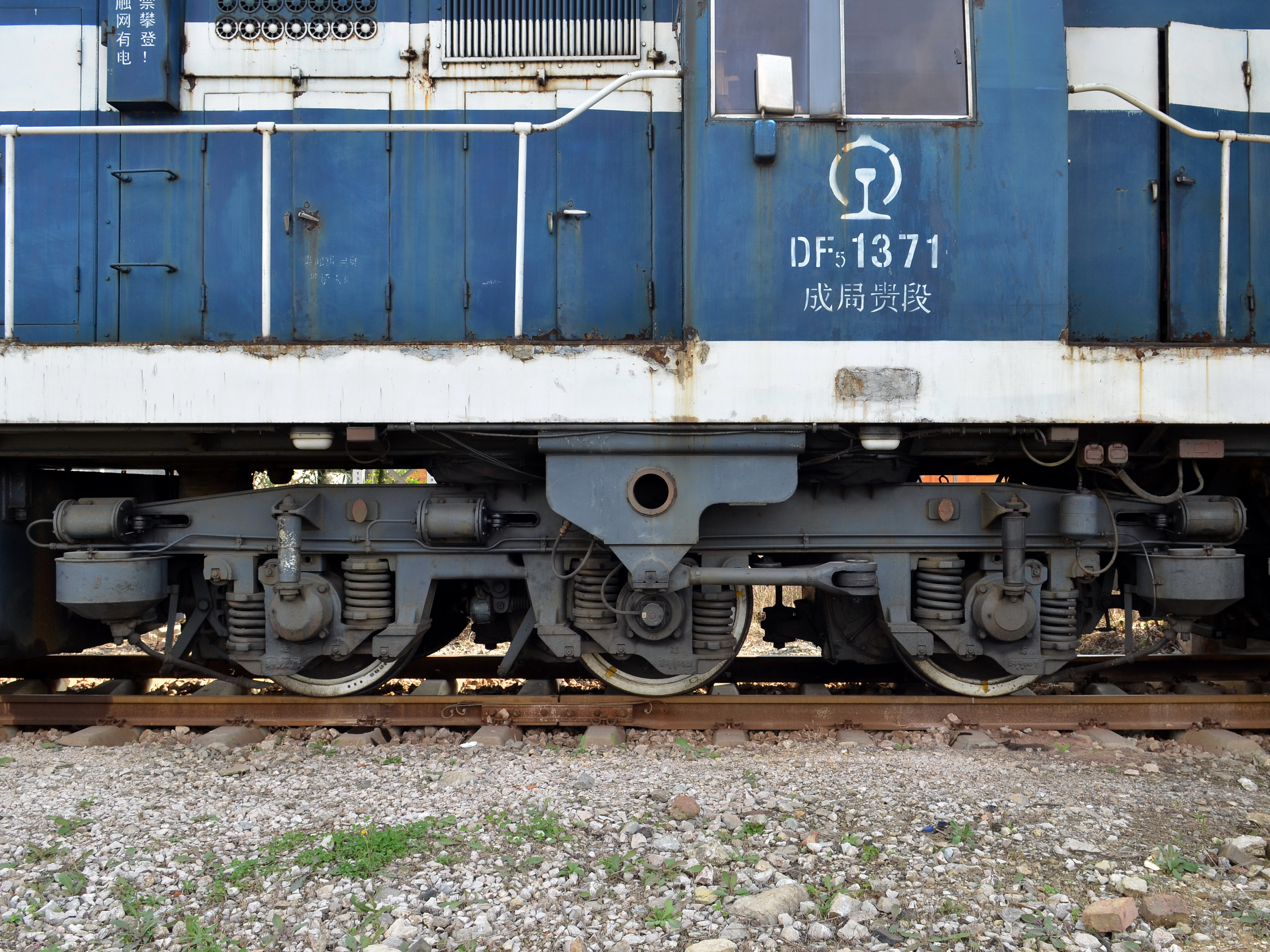 DF5型1371号机车 转向架